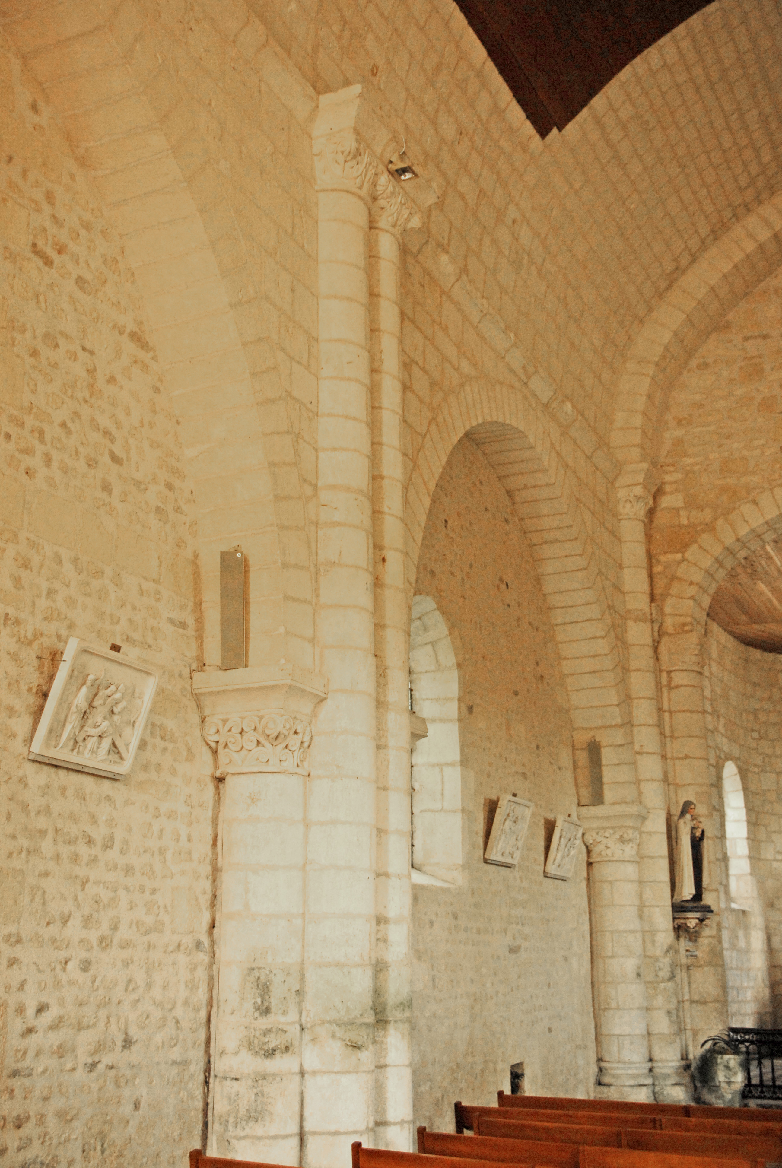 Fenioux,Schiff Nordwand